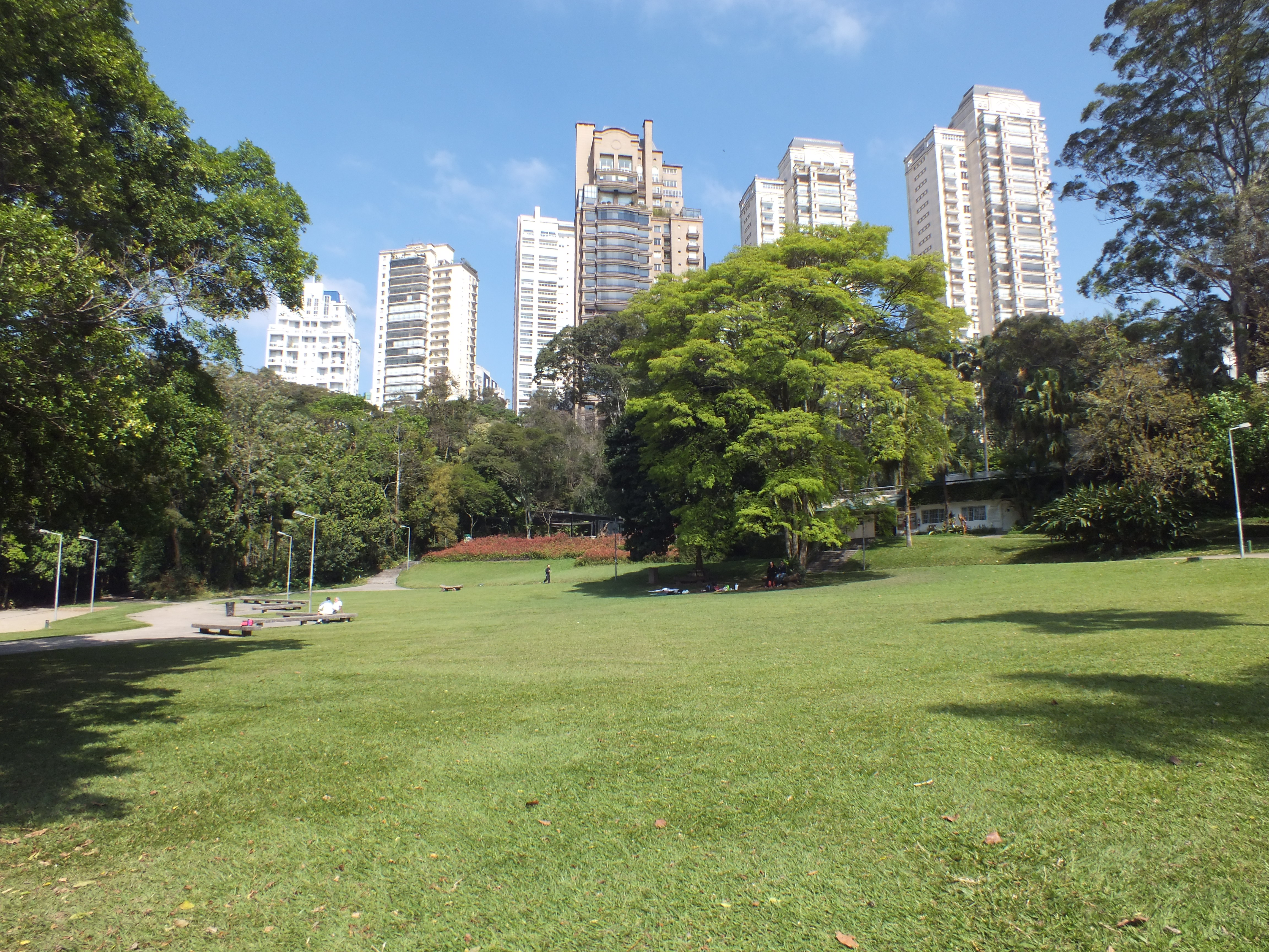 Canteiro central do Parque Burle Marx, localizado no Panamby. Essa é a primeira visão que os visitantes, que chegam de carro ao parque, tem.